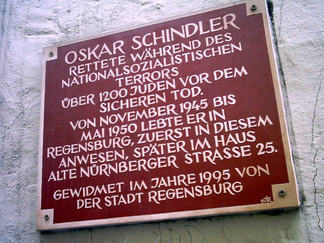 Regensburg (Bayern): Gedenktafel für Oskar Schindler Bildautor: Peter Bubenik - Aufnahmedatum: 30.04.2004 - Lizenz: GNU-FDL Bildbearbeitungen Von diesem Bild existieren die folgenden Bildbearbeitungen aus der Bilderwerkstatt: Image:300404 regensburg-gedenktafel-oskar-schindler 1-640x480-2.jpg Image:300404 regensburg-gedenktafel-oskar-schindler 1-640x480-3.jpg